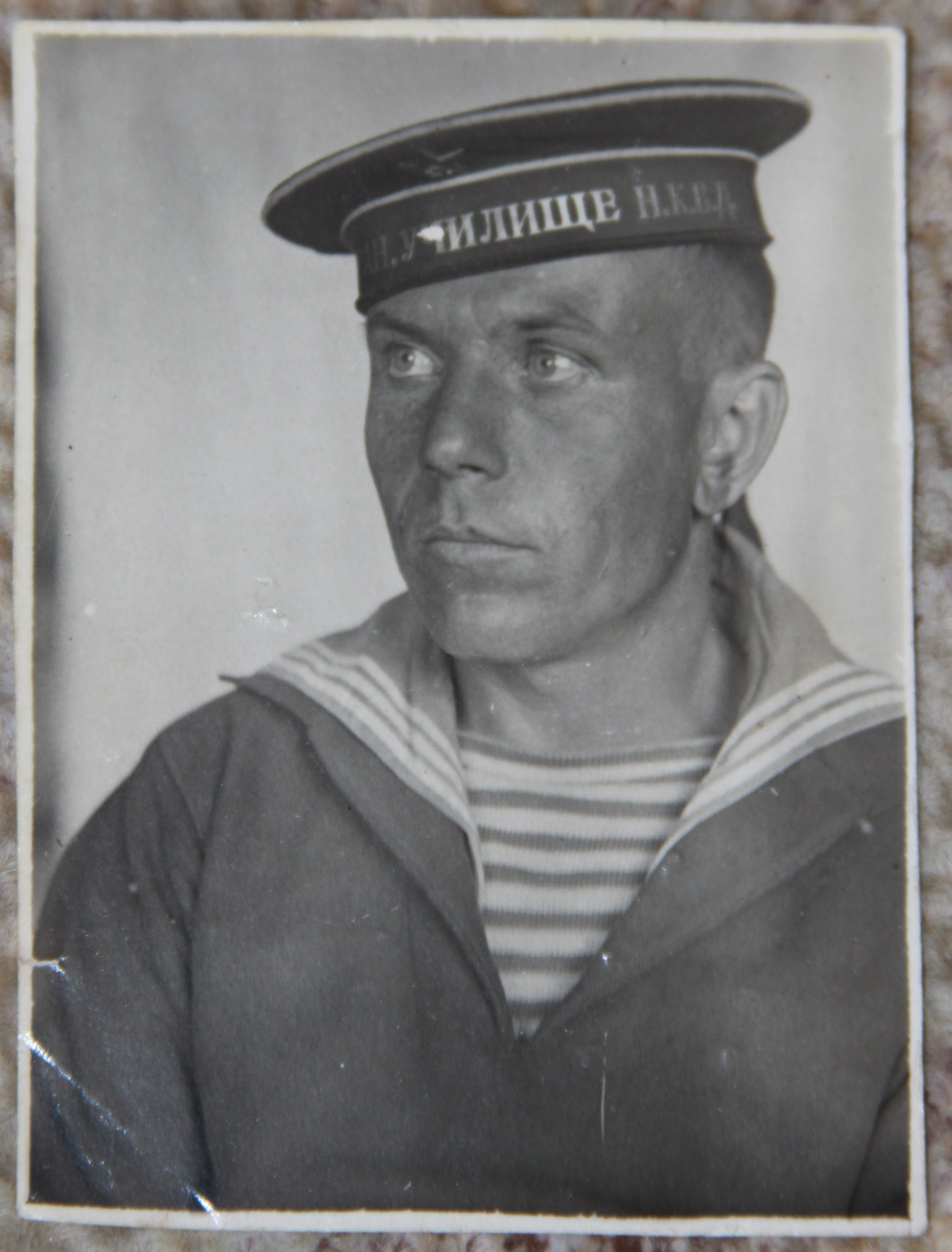 Павел Васильевич Власов в 1942 году.